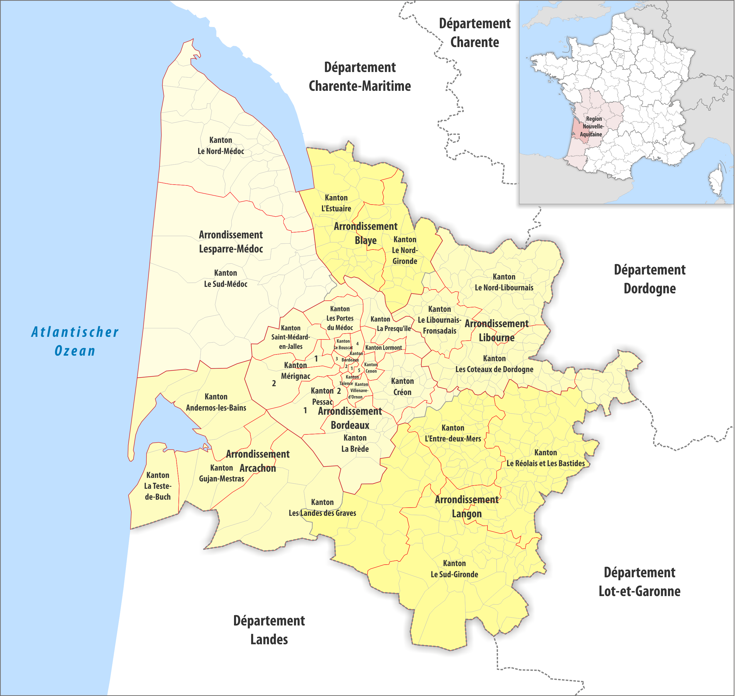 Gemeinden, Kantone und Arrondissemente im Departement Gironde